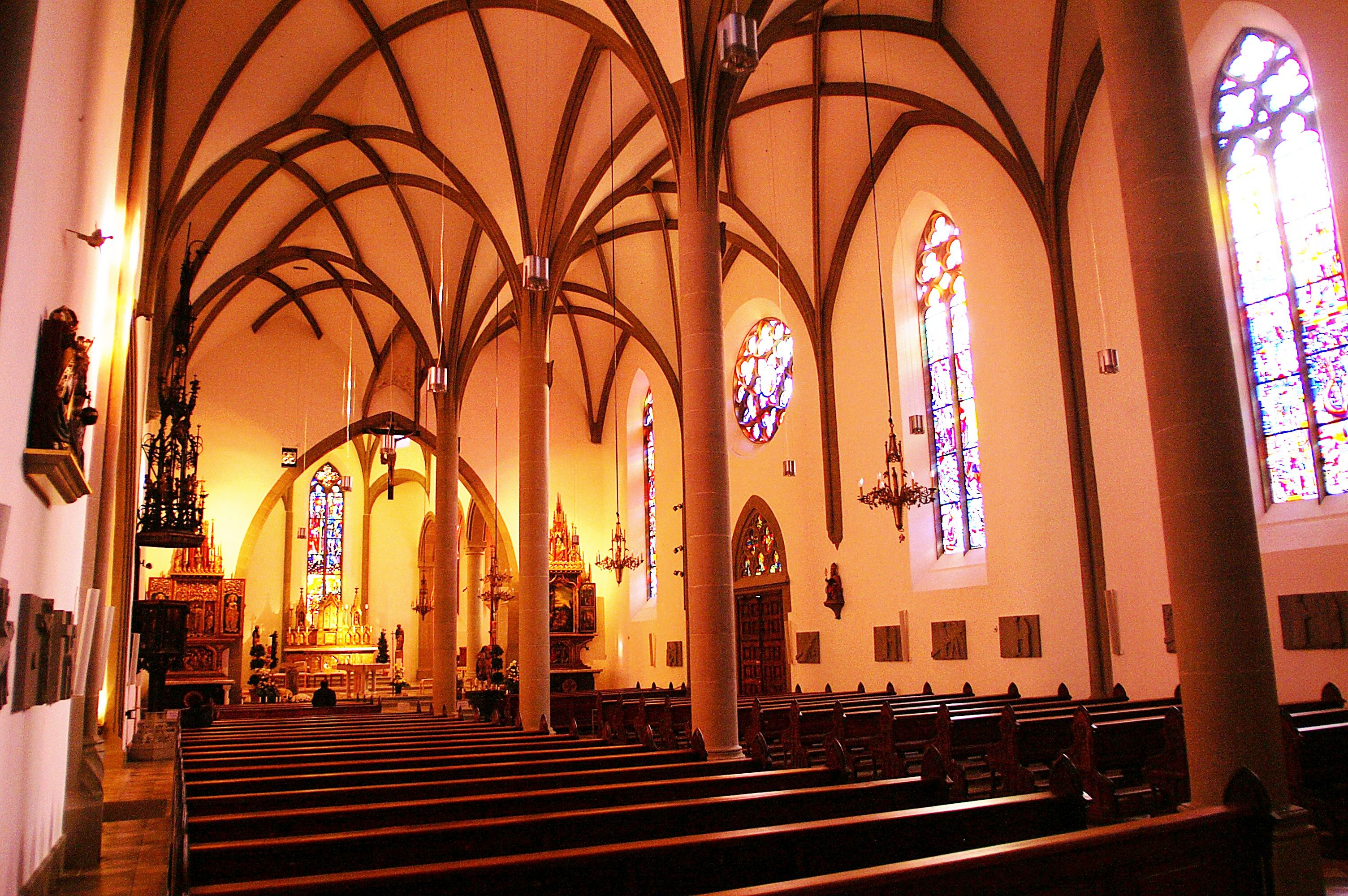 Mittelschiff und rechtes Schiff im Dom St.Nikolaus in Feldkirch, Vorarlberg